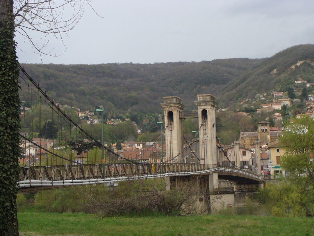 Le pont sur la Saône entre Rochetaillée-sur-Saône et Couzon-au-Mont-d'Or (Rhône)